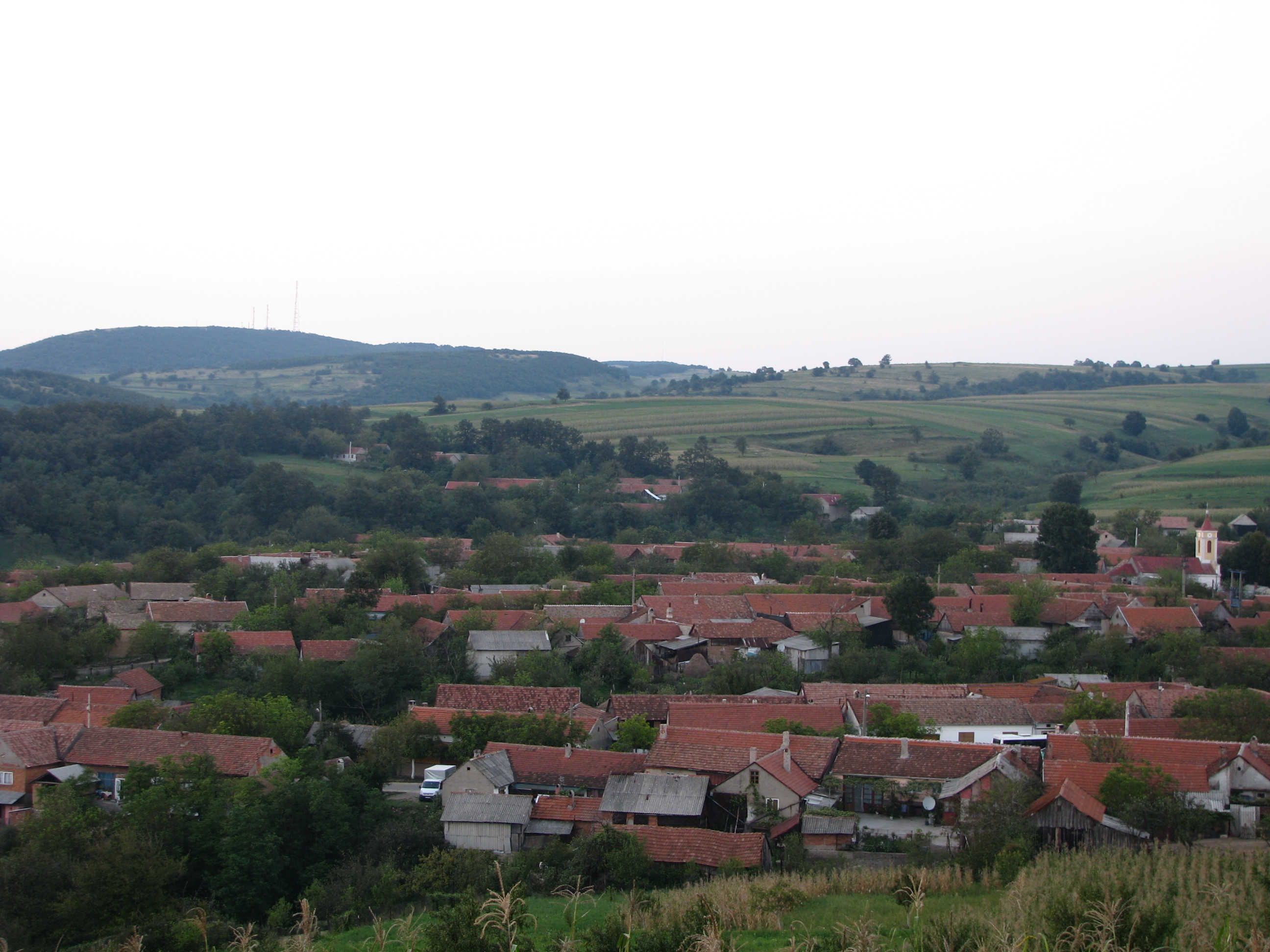 Svatá Helena, Banát, Rumunsko.